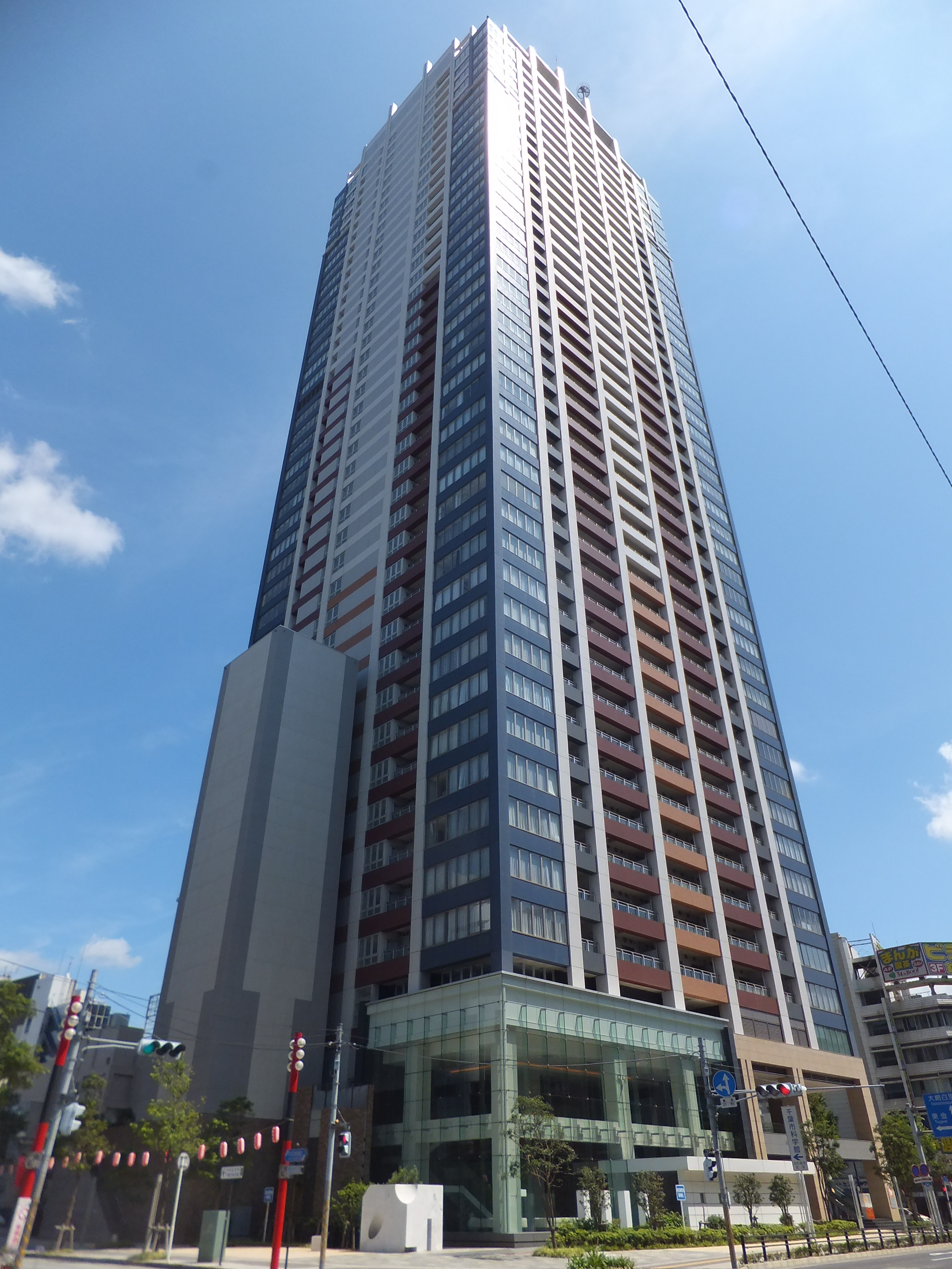 千葉市中心部で最高層のタワーマンション、Chiba Central Tower（千葉セントラルタワー）